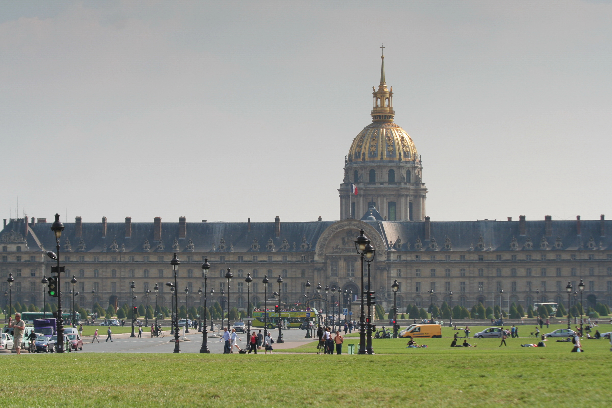 Esplanade des Invalides